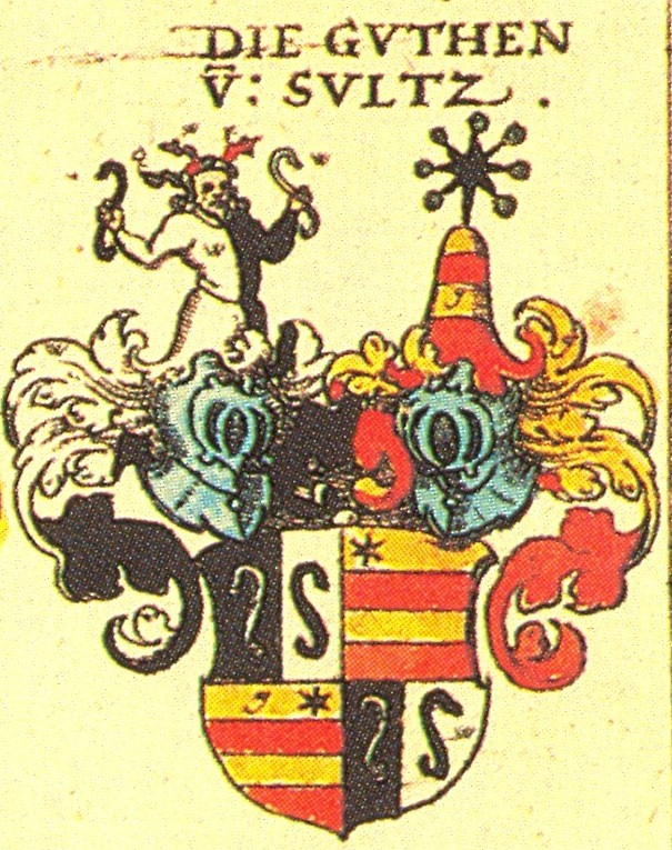 Ritterschaft und Adel in Schwaben Die Guth von Sultz